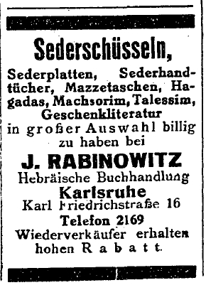 Anzeige für Buchhandlung J. Rabinowitz, Karlsruhe, 1925.